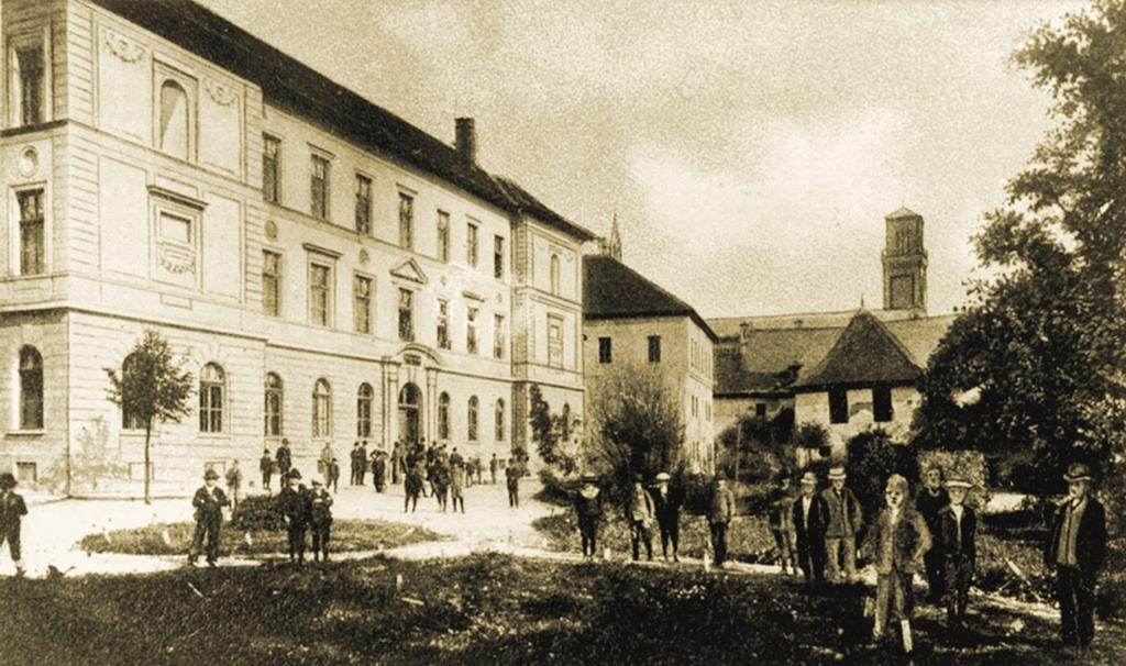 Starý Kežmarok - Evanjelické lýceum